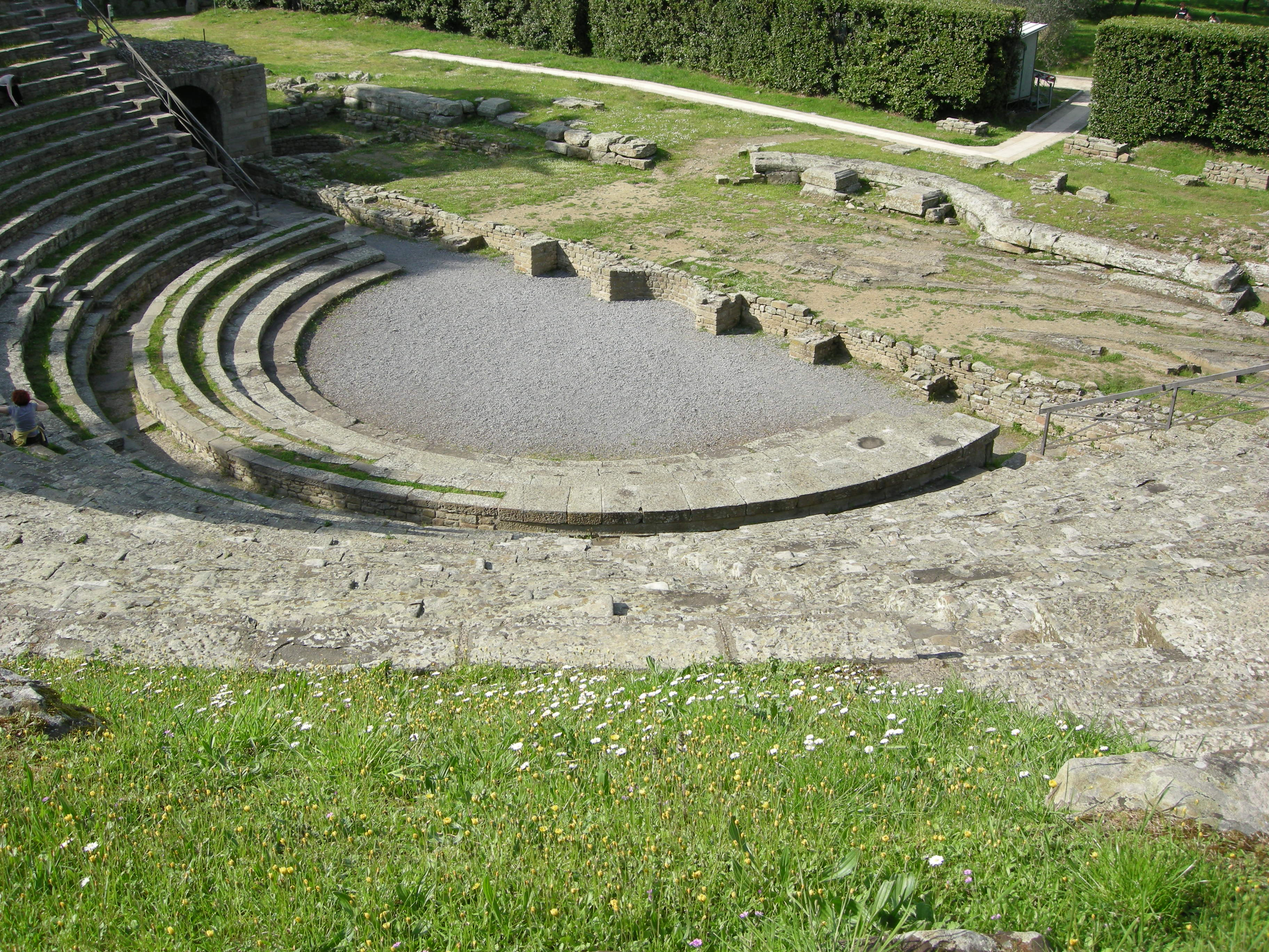 Fiesole, area archeologica, teatro